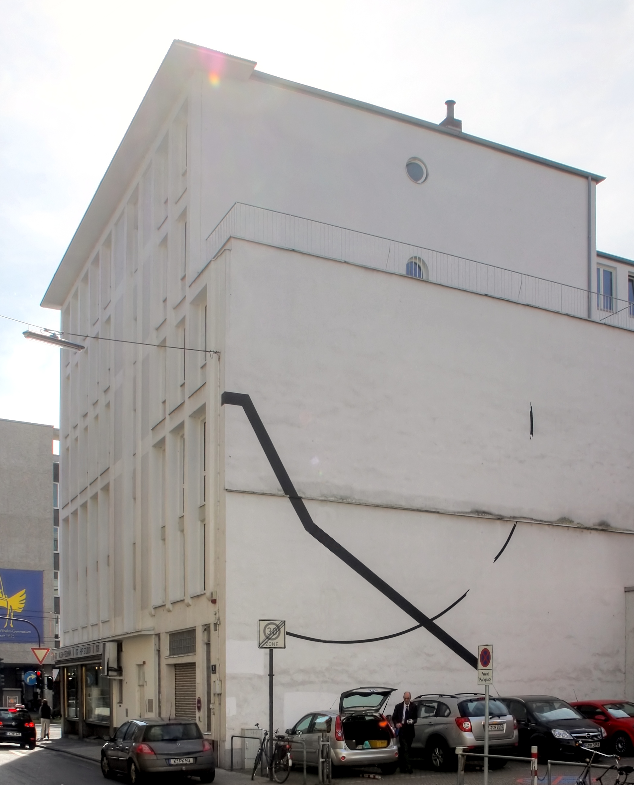 Malerei von Stefan Wewerka am Haus Lempertz Köln, Neumarkt. Ansicht von der Kronengasse.